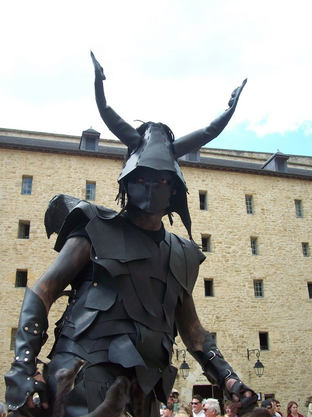 16ème festival (22 mai 2011). Le Château-fort de Sedan abritera son 17ème festival médieval les 19 et 20 mai 2012.